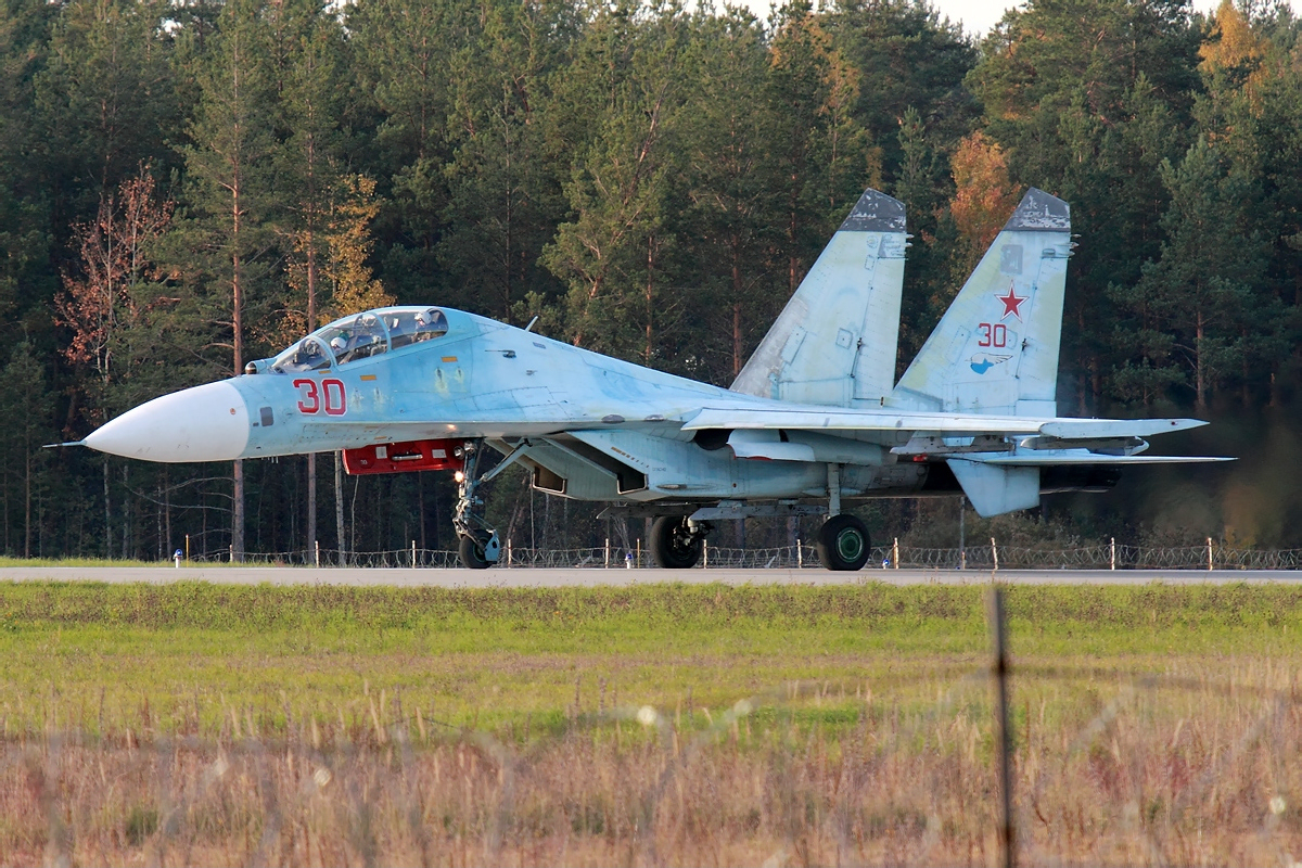 Sukhoi Su-27UB